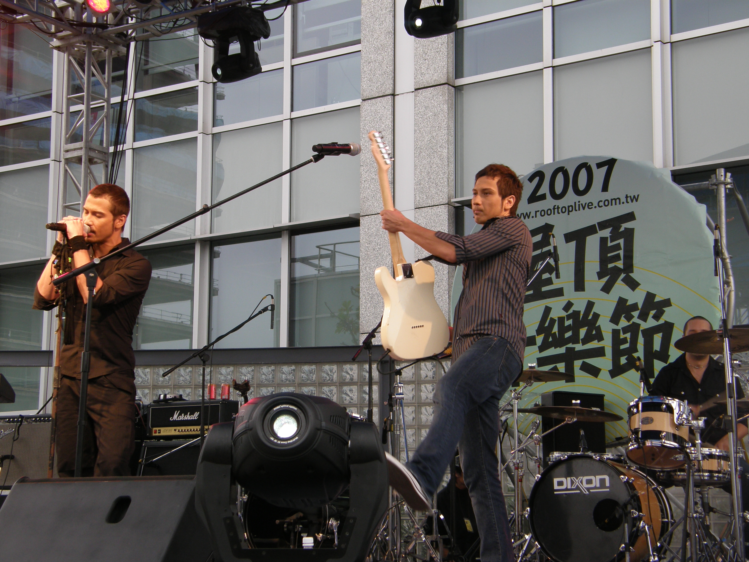 Soler